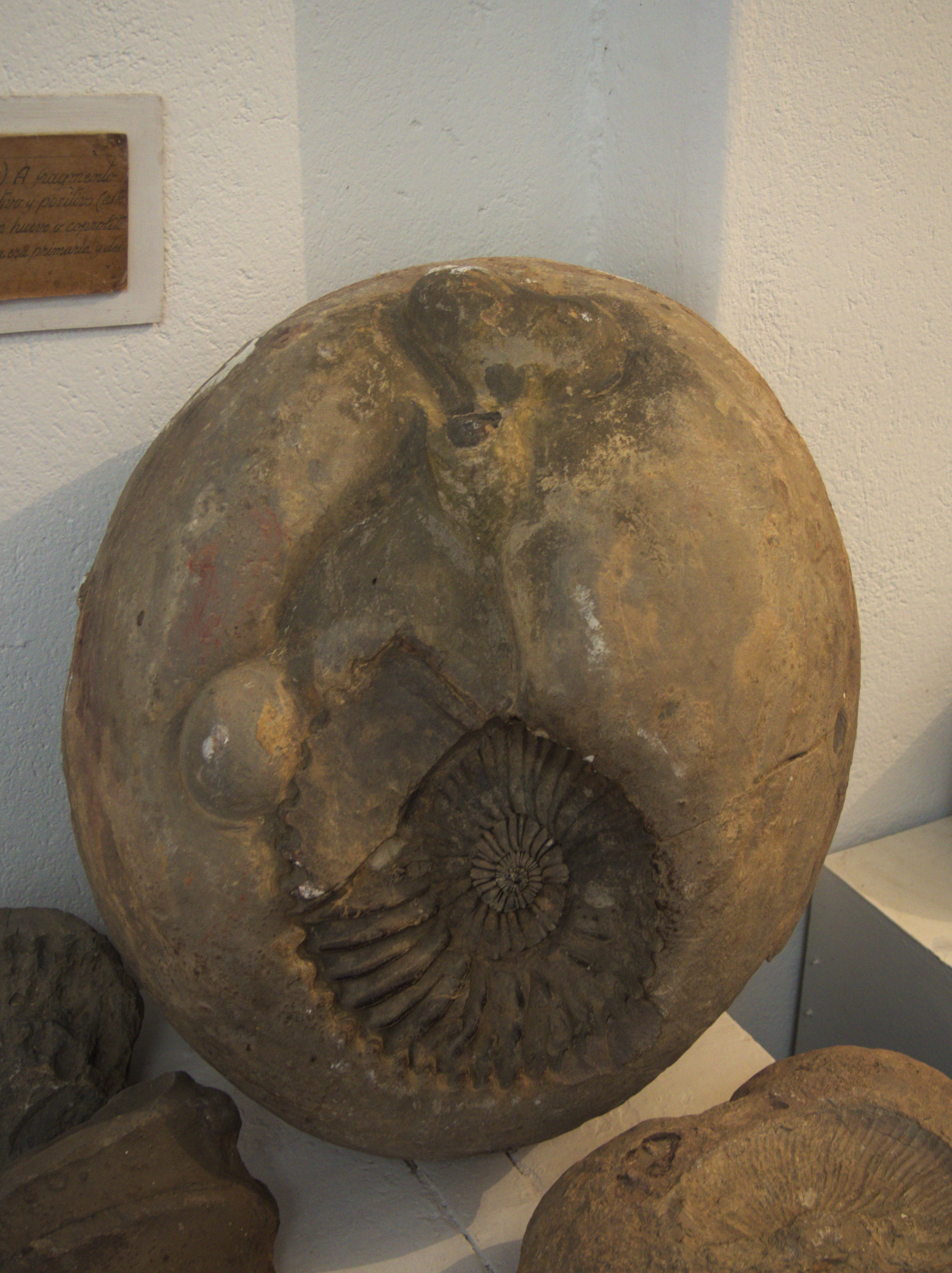 An ammonoid fossil in a concretion, in Colombia